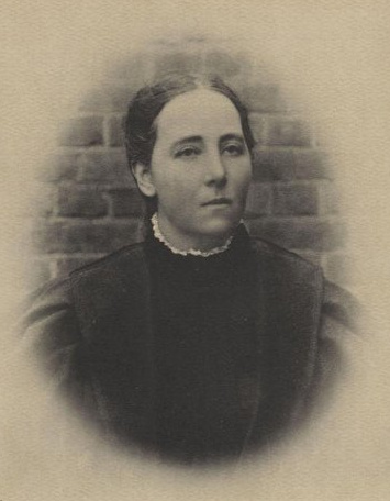 Людмила Александровна Волкенштейн (урождённая Александрова) (18 сентября 1857, Киев —10 января 1906 Владивосток) — русская революционерка, член партии «Народная воля».